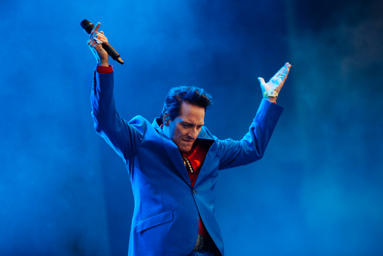 Bela B auf dem Highfield Festival 2014